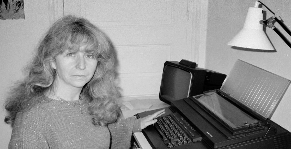 L'écrivaine et scénariste française Marie-France Briselance et son premier ordinateur (Olivetti) en 1988